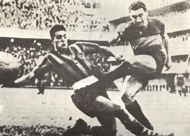 Pancita Biagioli cierra ante Pizzutti.